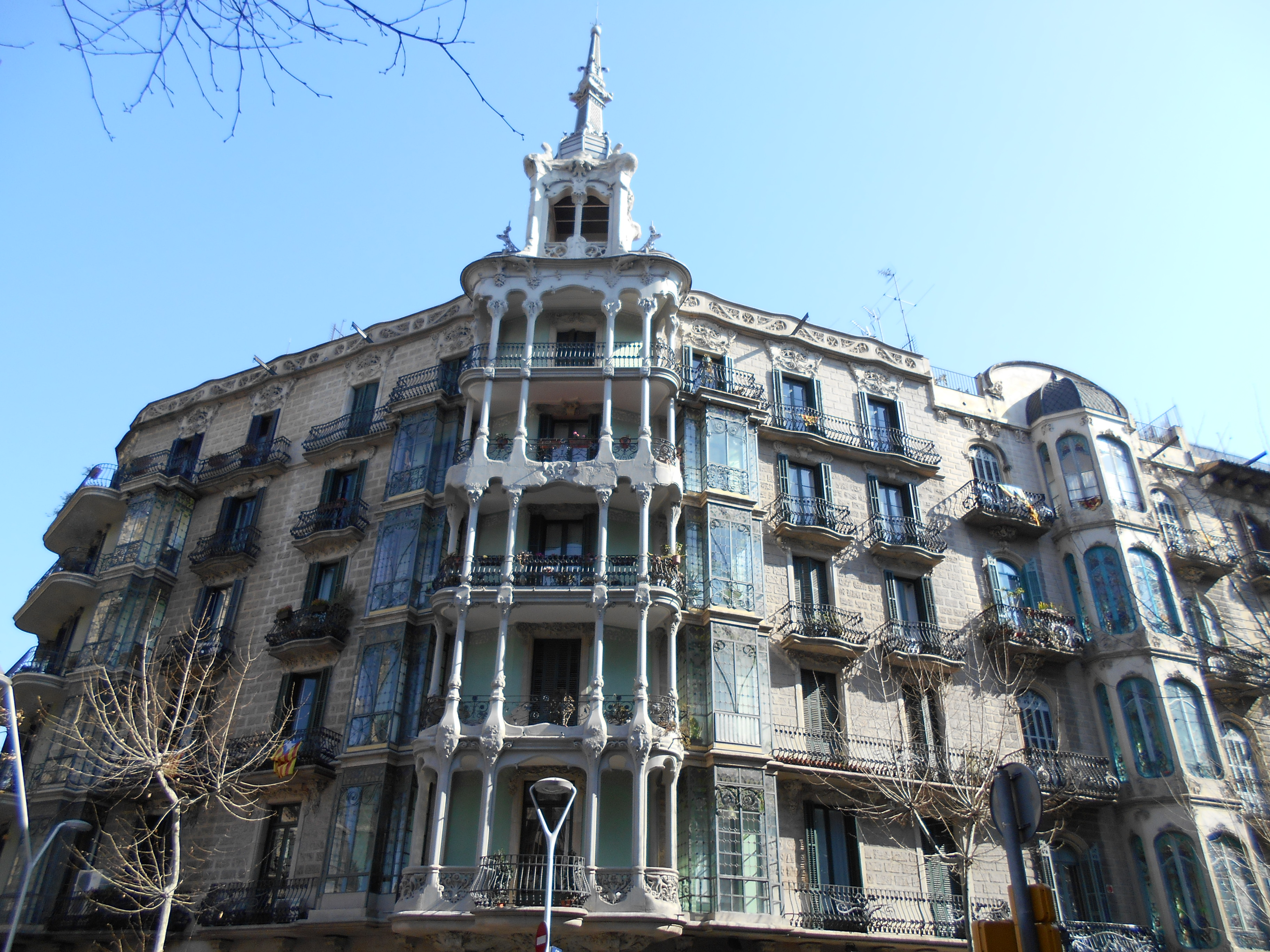 Casas Josefa Villanueva.